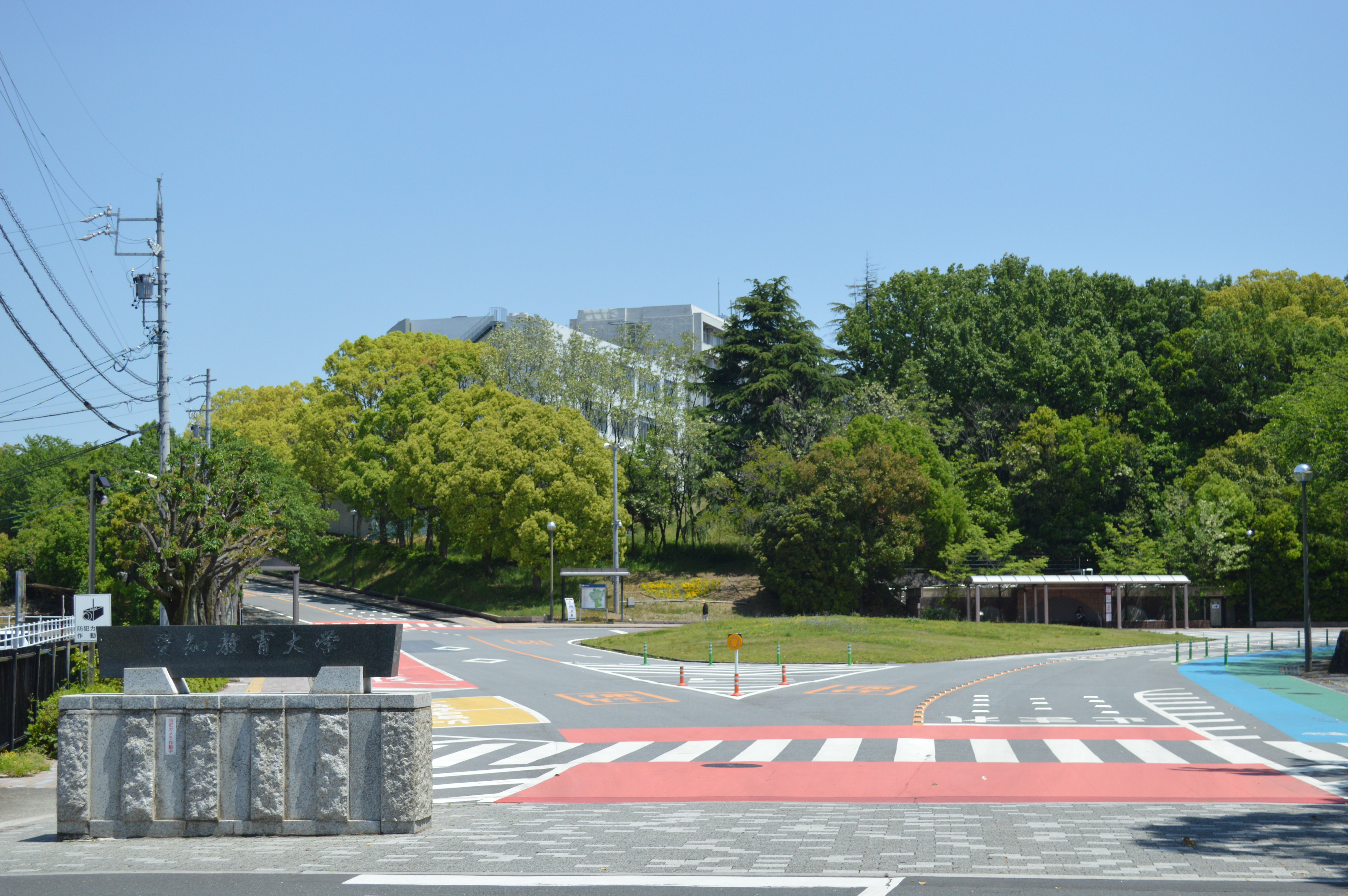 愛知教育大学の正門、愛知県刈谷市